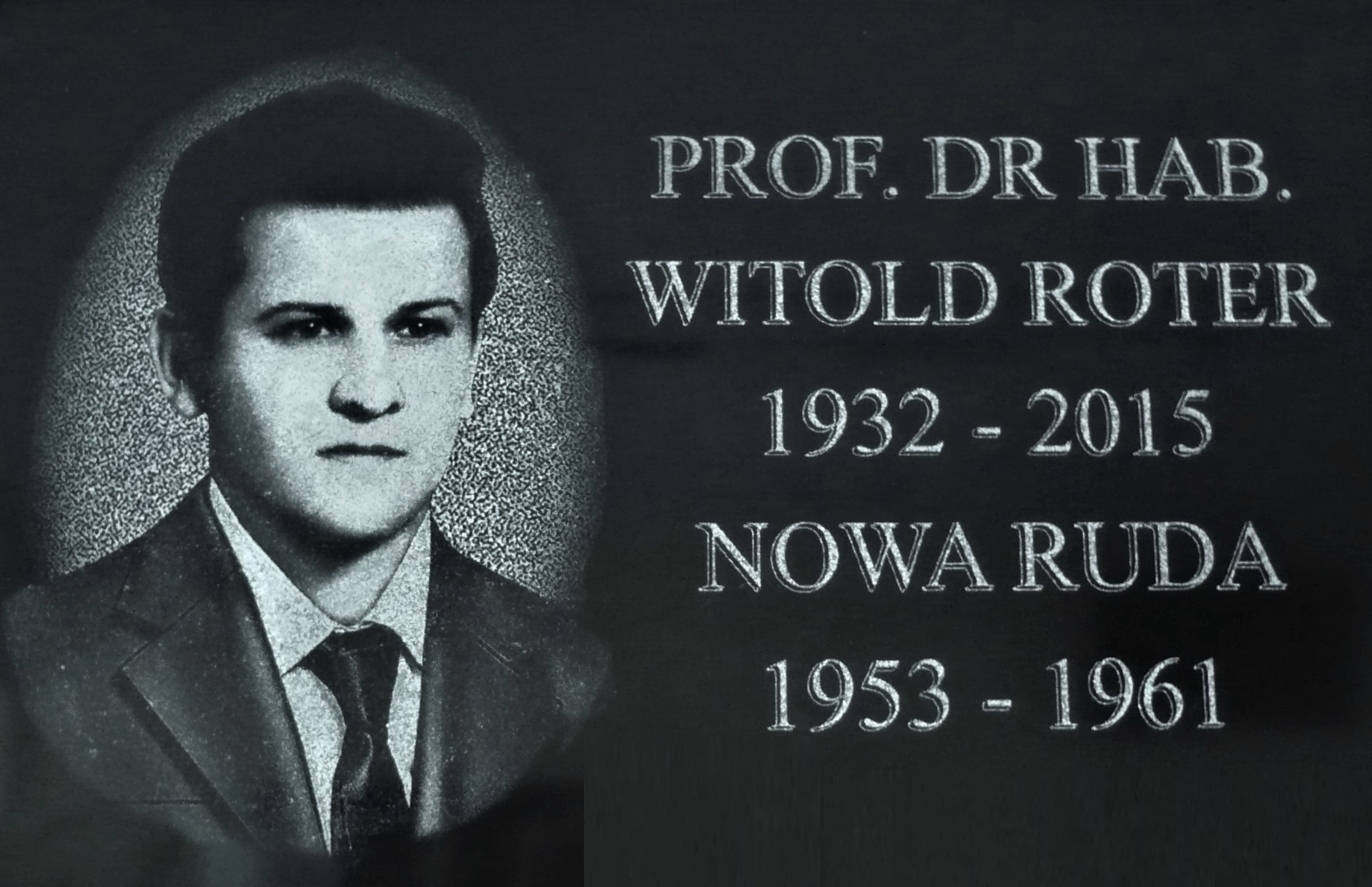 Witold Roter (1932-2015). Tablica w LO w Nowej Rudzie